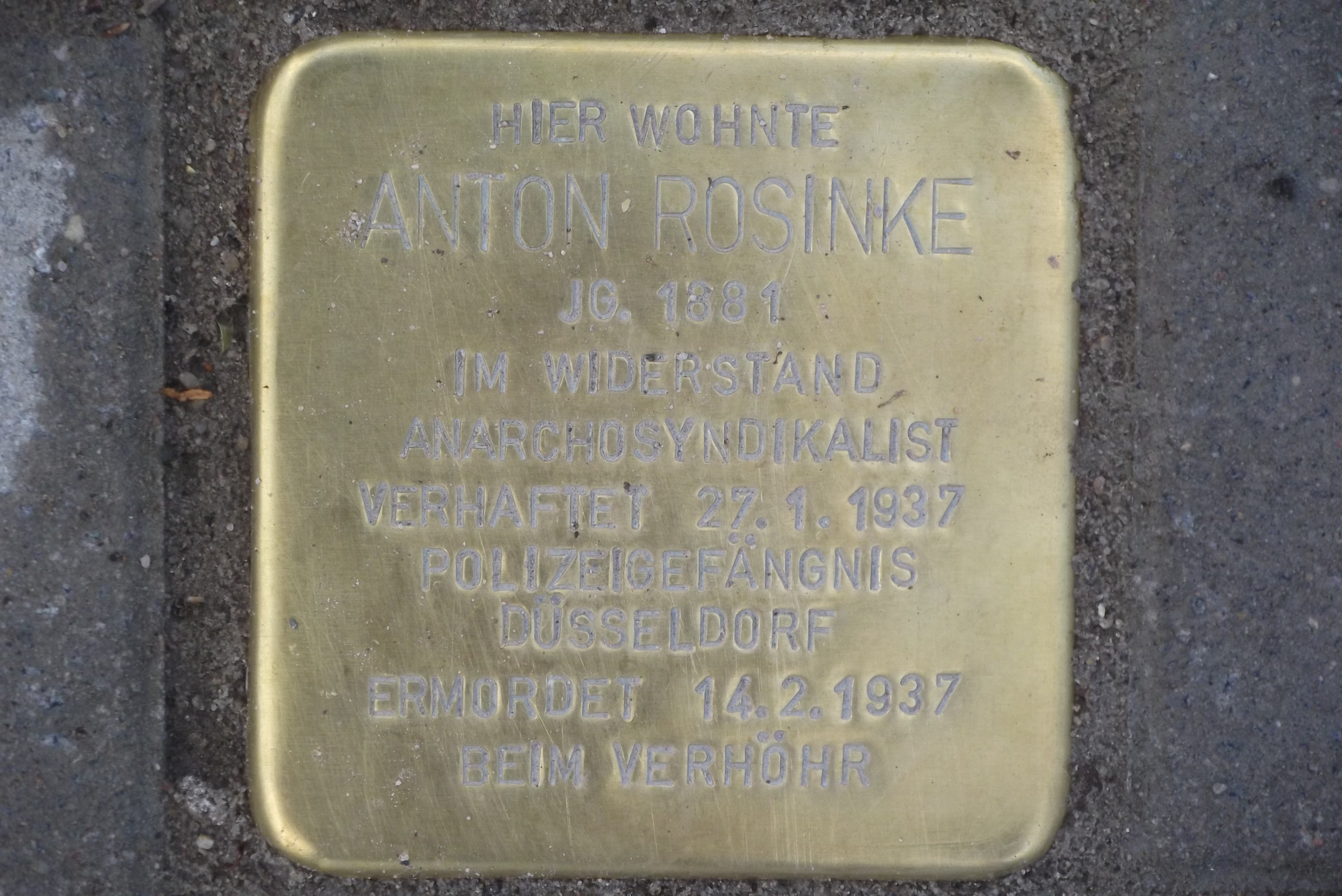 Hier wohnte Anton Rosinke, Jg. 1881, im Widerstand, Anarchosyndikalist, verhaftet 27.1.1937 Polizeigefängnis Düsseldorf, ermordet 14.2.1937 beim Verhöhr